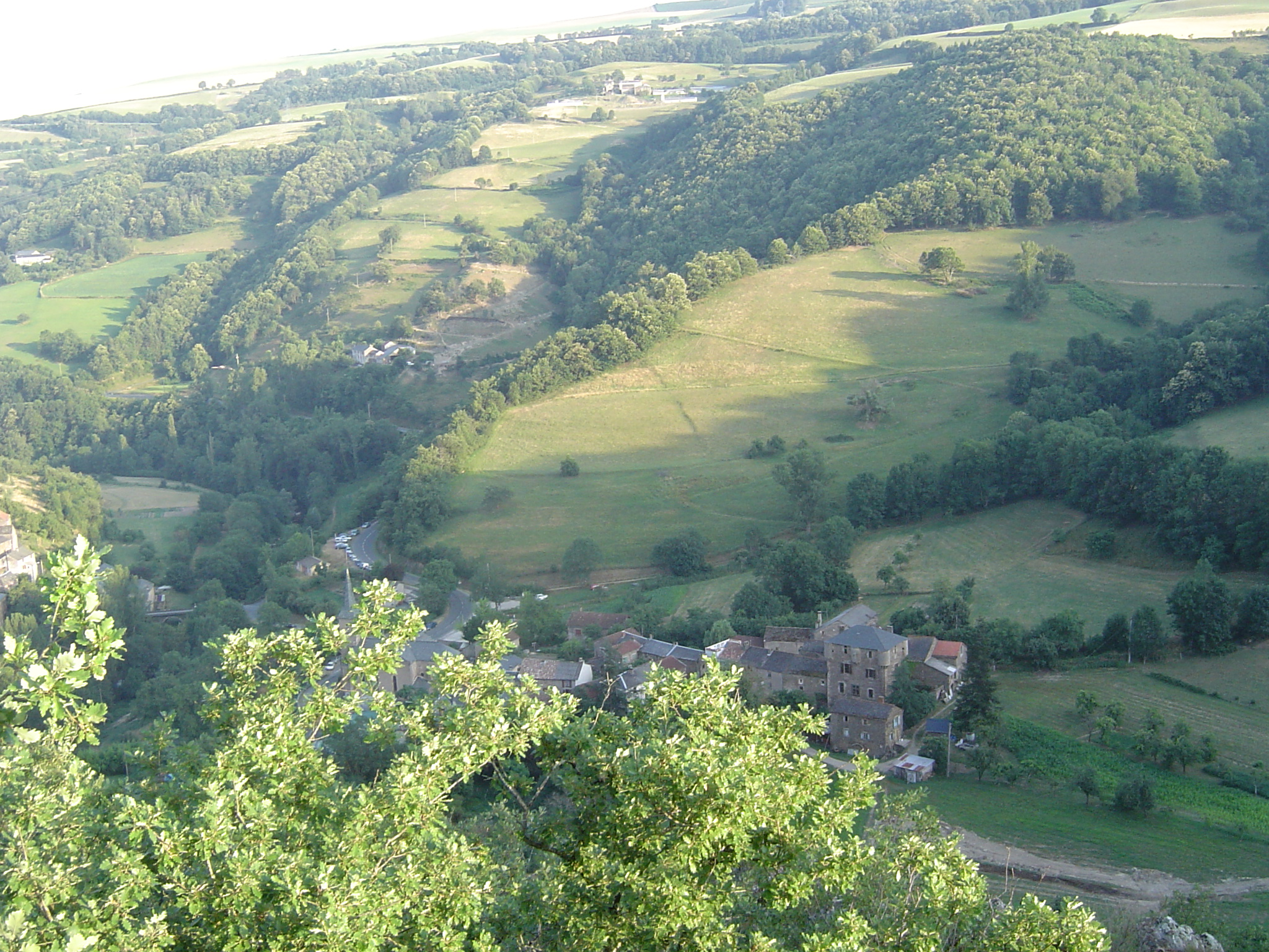 Photo de Balaguier sur Rance ("Balaguier le Gras") prise en juillet 2010 depuis la Route menant vers Miolles.